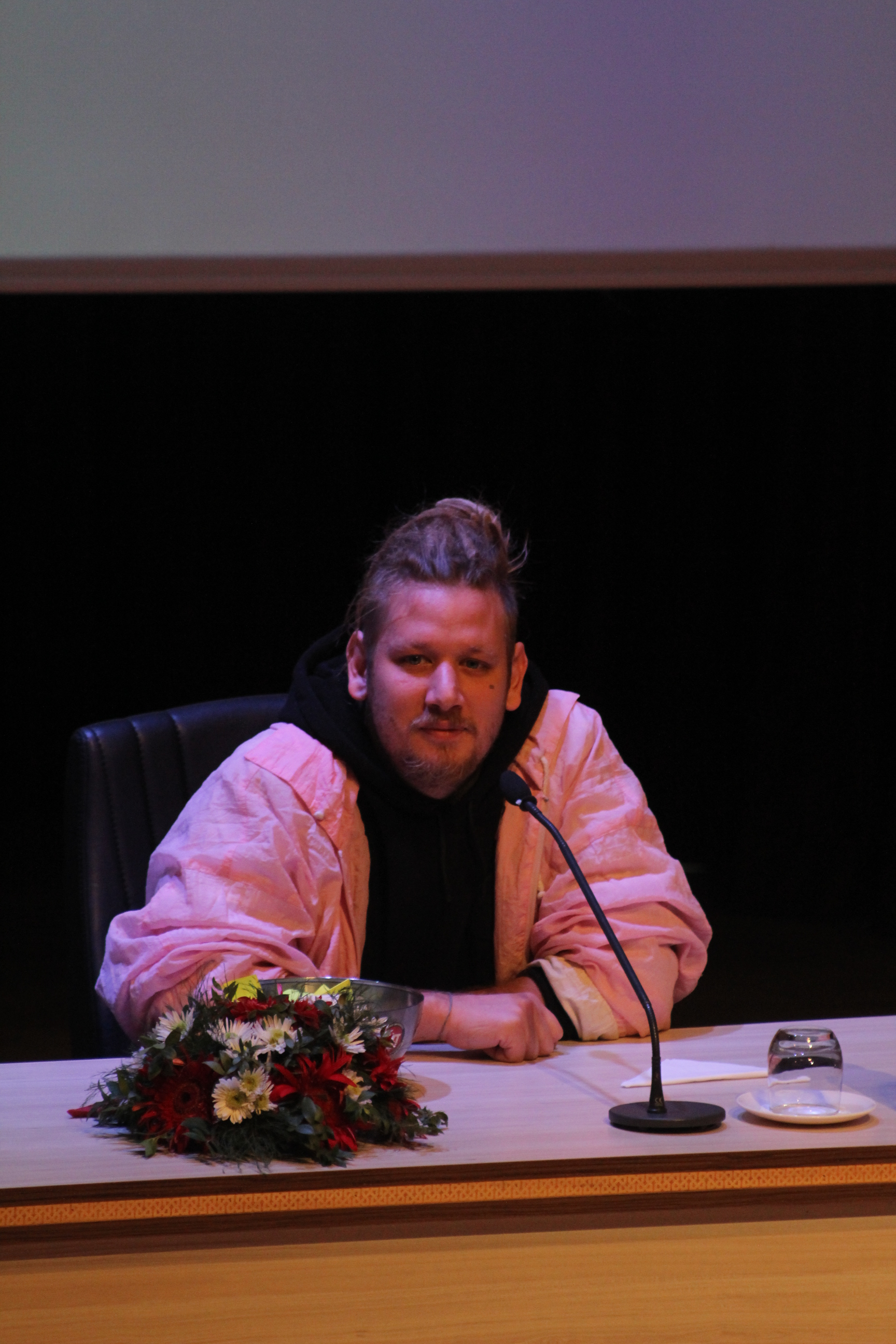 Şanışer, Sokrat ST ile 23 Kasım 2018'deki Akdeniz Üniversitesi söyleşilerinde iken.